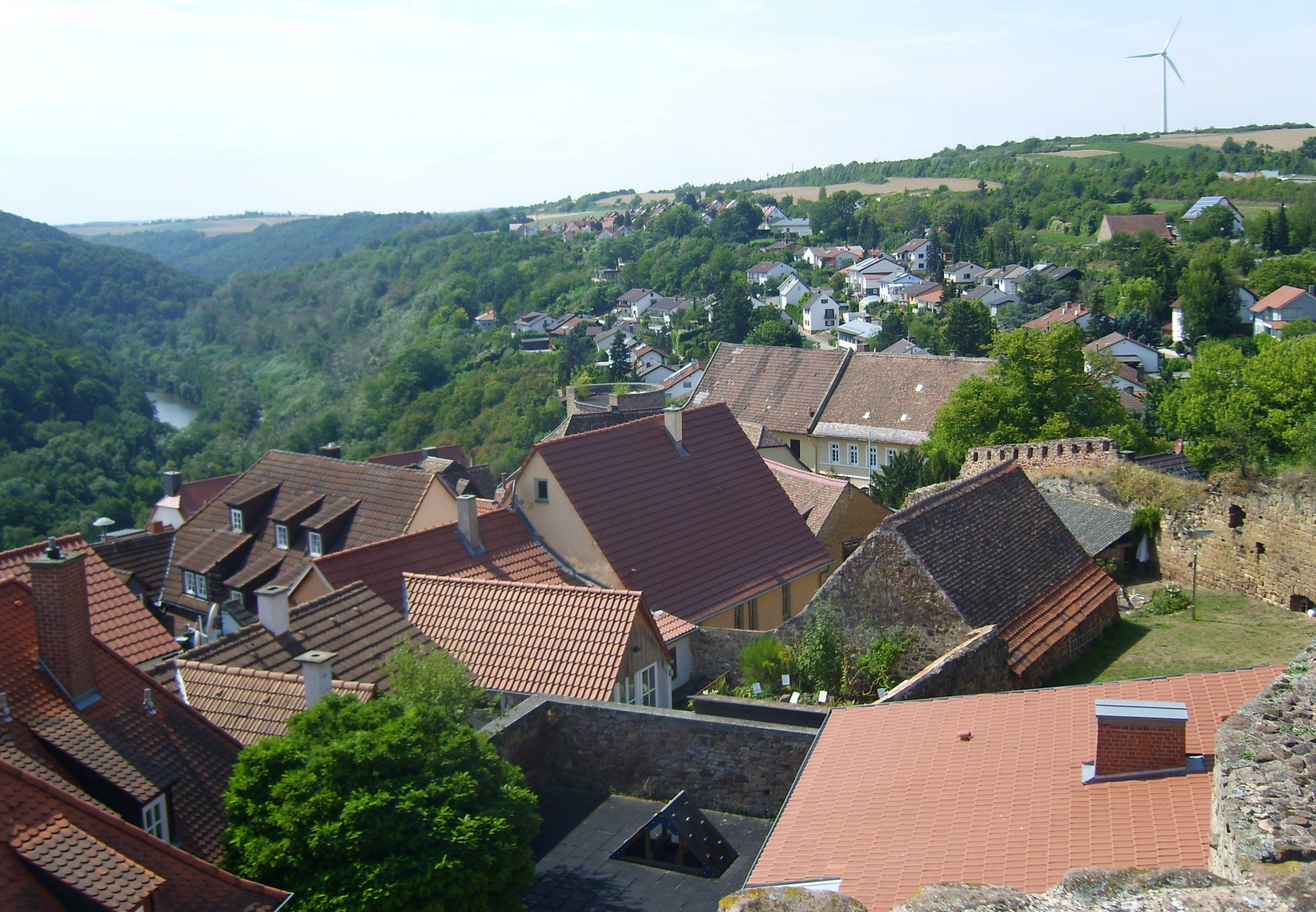 Blick von Burg Neuleiningen auf das Eckbach­tal nebst Eckbachweiher am Nordrand des Pfälzerwaldes und das Windrad an der Bitternell (336,7 m), dem Südwestgipfel des Grünstadter Bergs im äußersten Süden des Alzeyer Hügellandes, darunter die A 6 und Neuleiningen; links im Hintergrund der Kleine Donnersberg (bis 328,6 m) mit dem Weiler Nackterhof